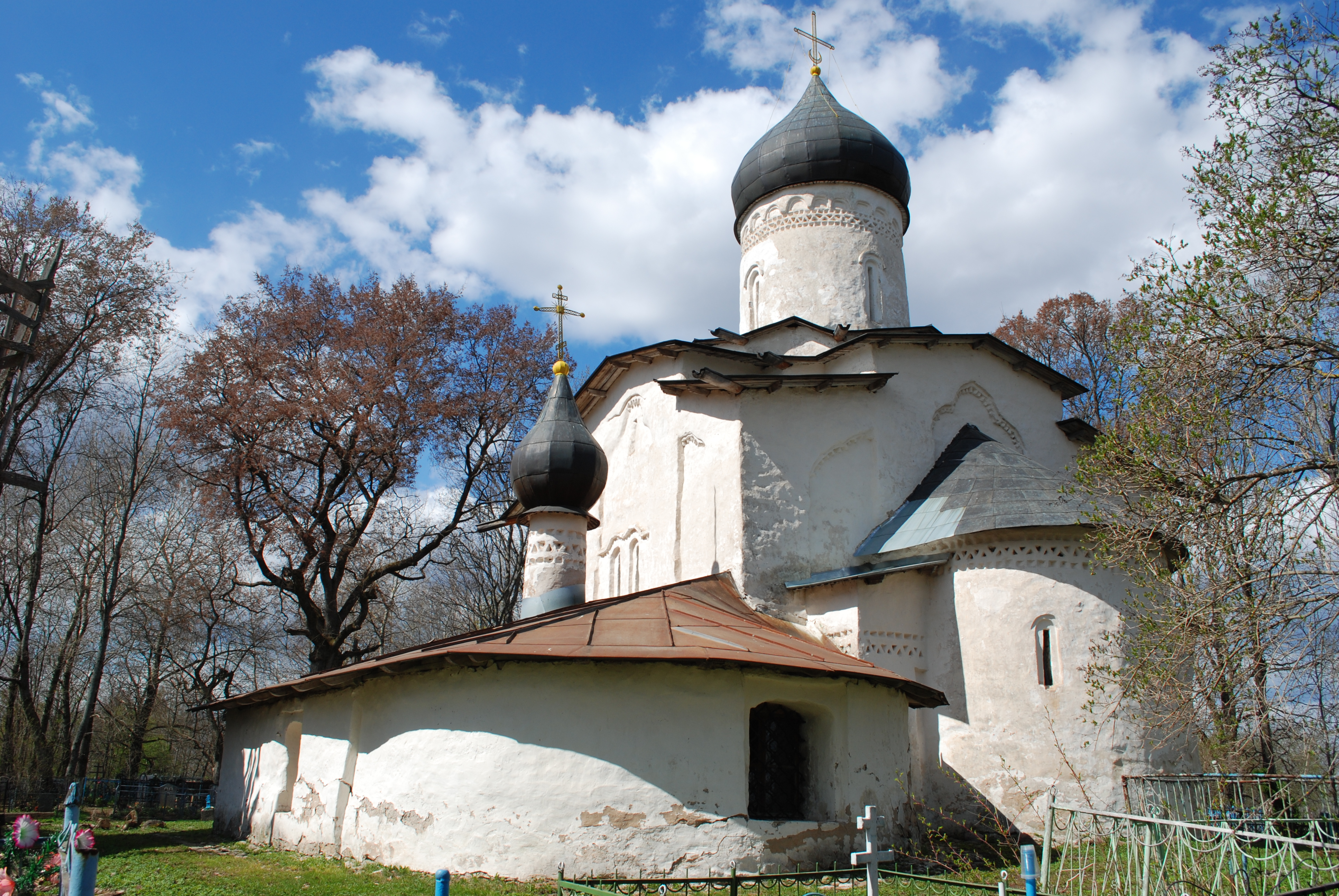 Церковь Успения в Мелетове с росписью (Псковская область, Порхов, село Мелетово, у Большого Загорья)